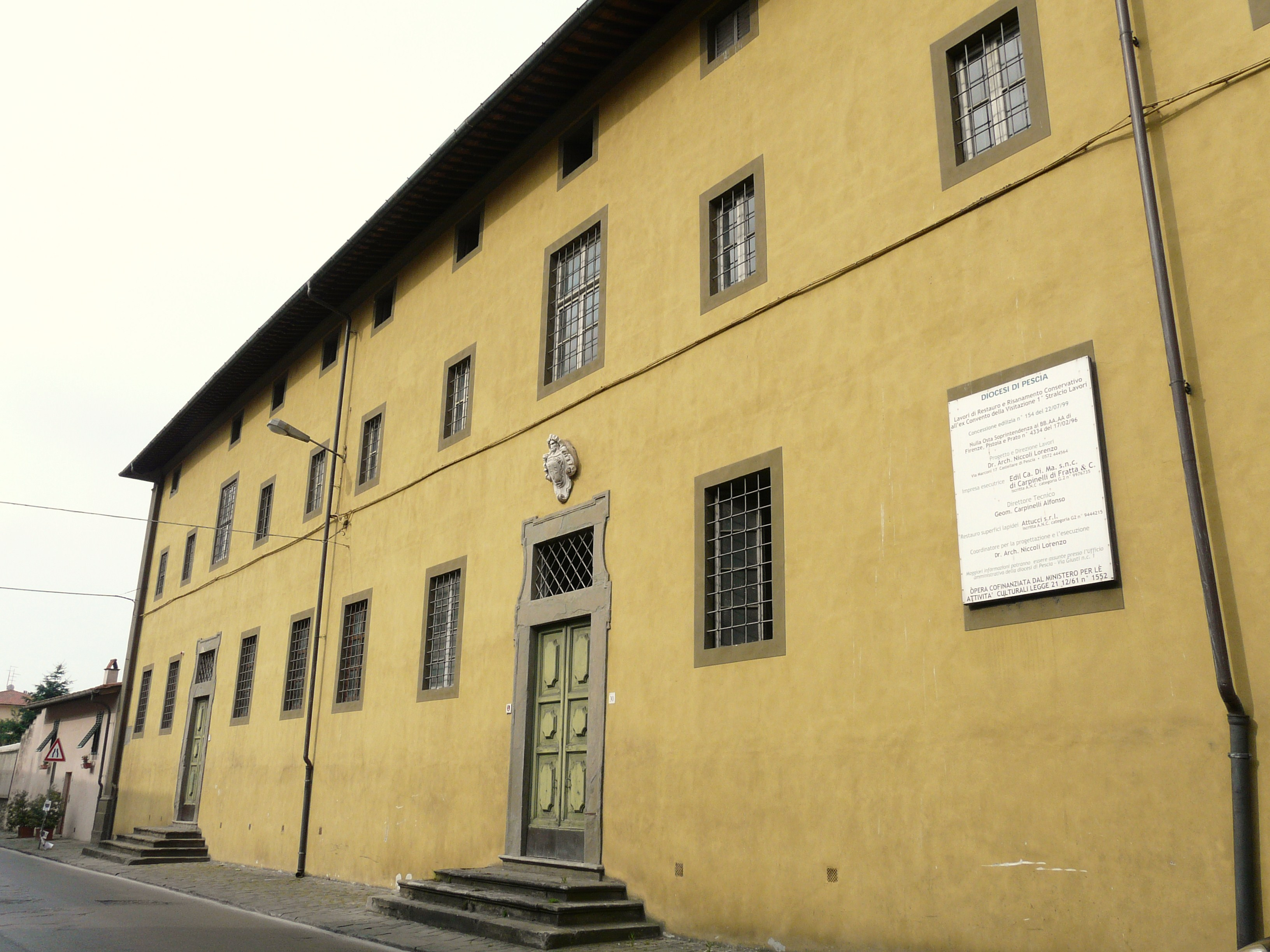 Ex convento della Visitazione, Comune di Pescia, Toscana, Italia